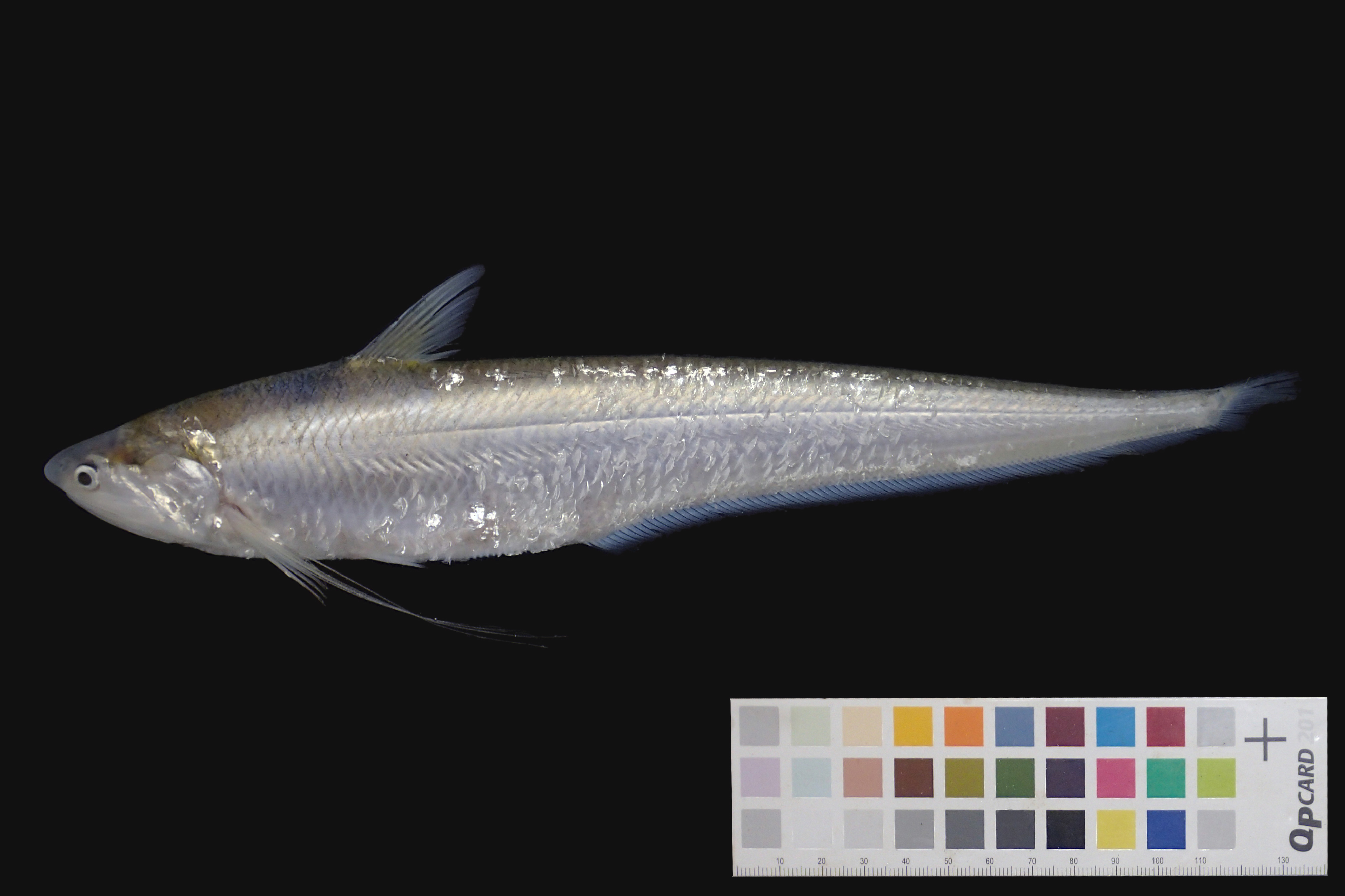 エツの成魚（有明海産）。詳細